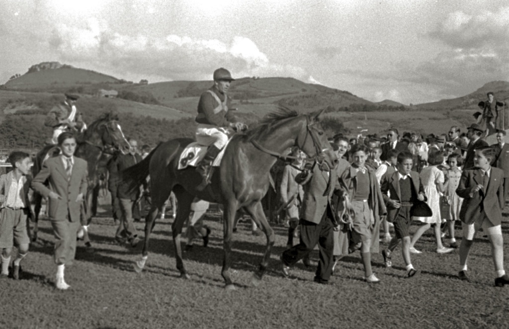 Título original: Carreras de caballos en el hipódromo de Lasarte (19/24) Localización: San Sebastián (Guipúzcoa)